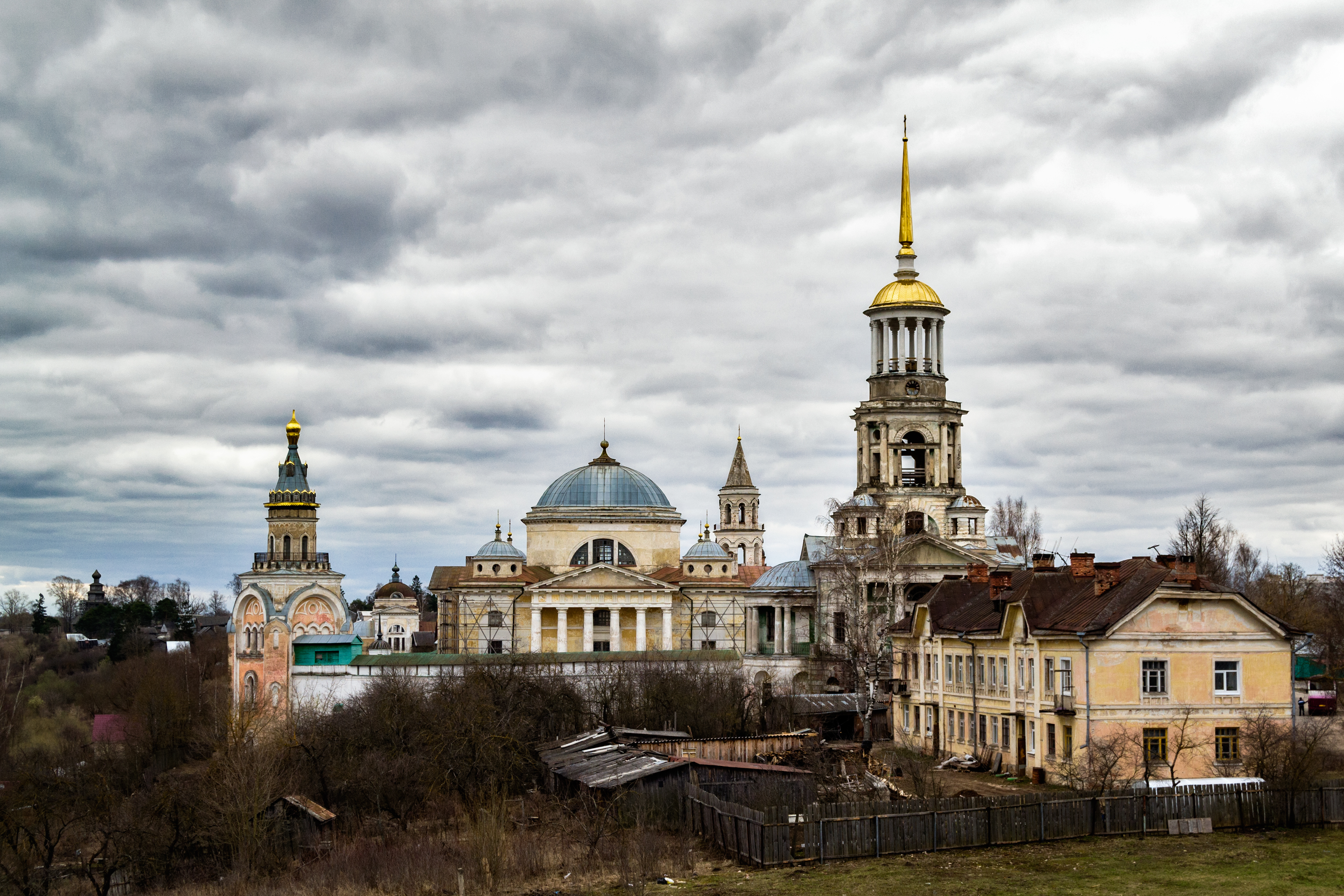 Вид с горы на монастырь.